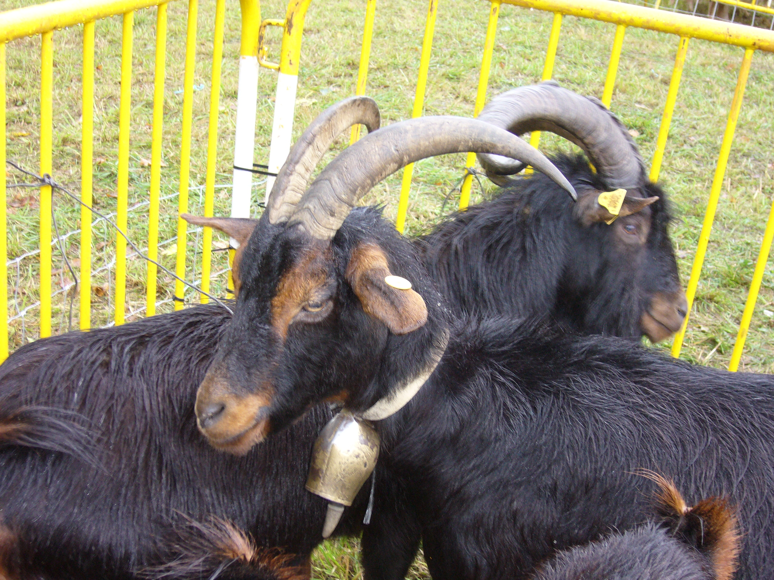 Ahuntz azpigorriak